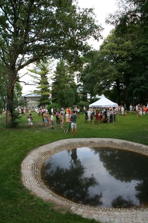 Loomemajanduskeskuse ja loodusmaja park.